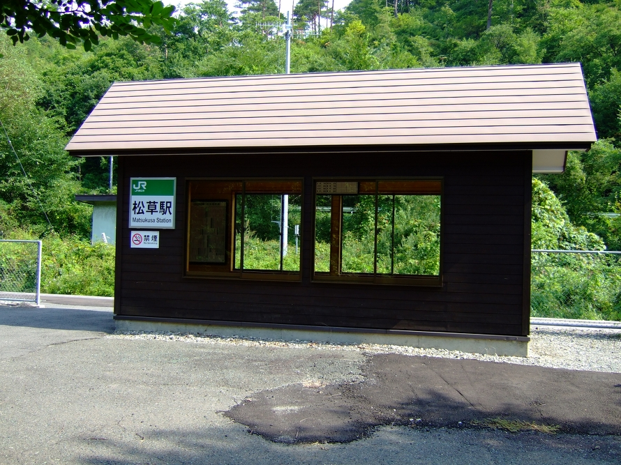 Matsukusa Station, Miyako, Iwate, Japan